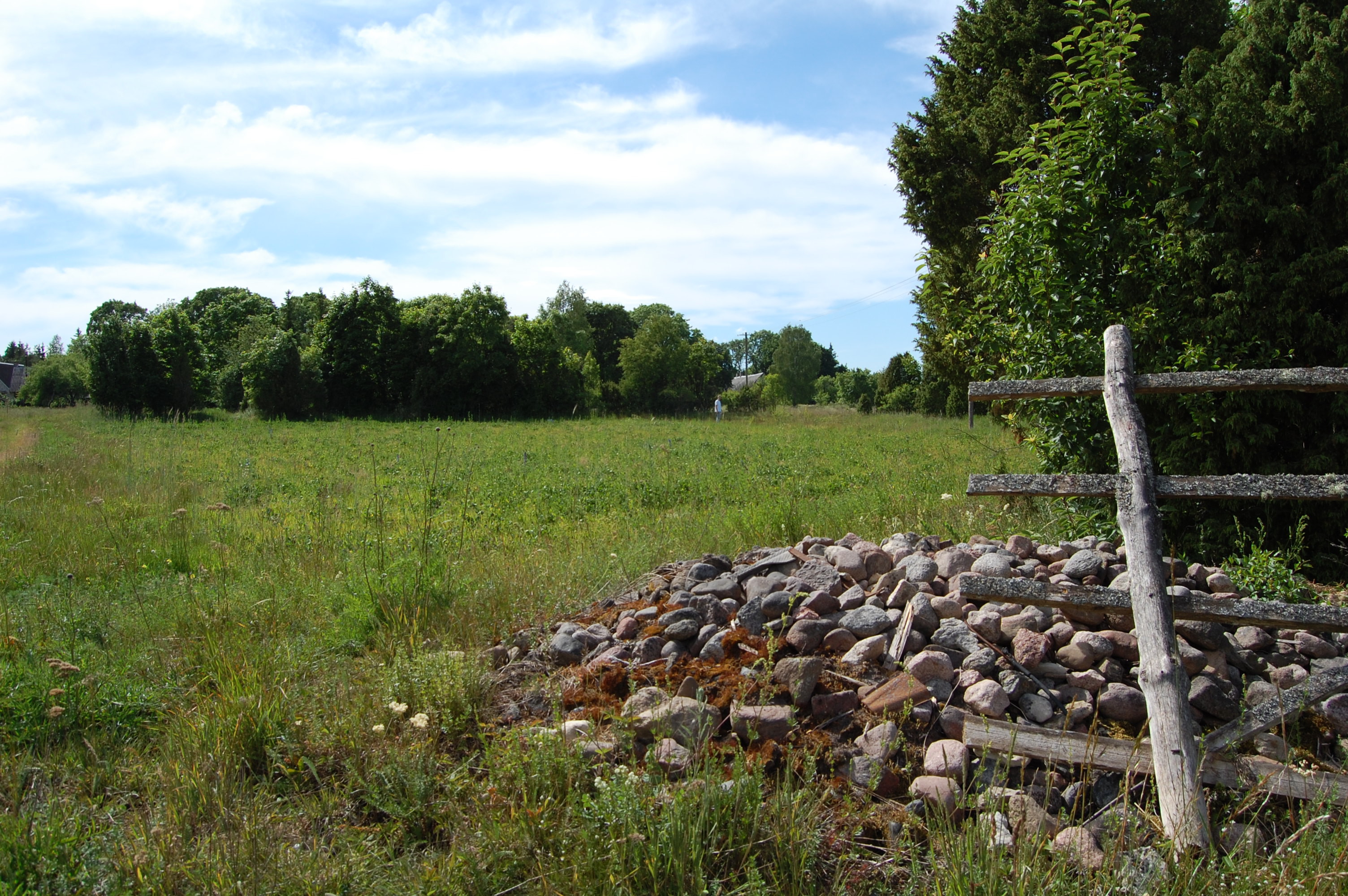 Päädla maalinn Muhus